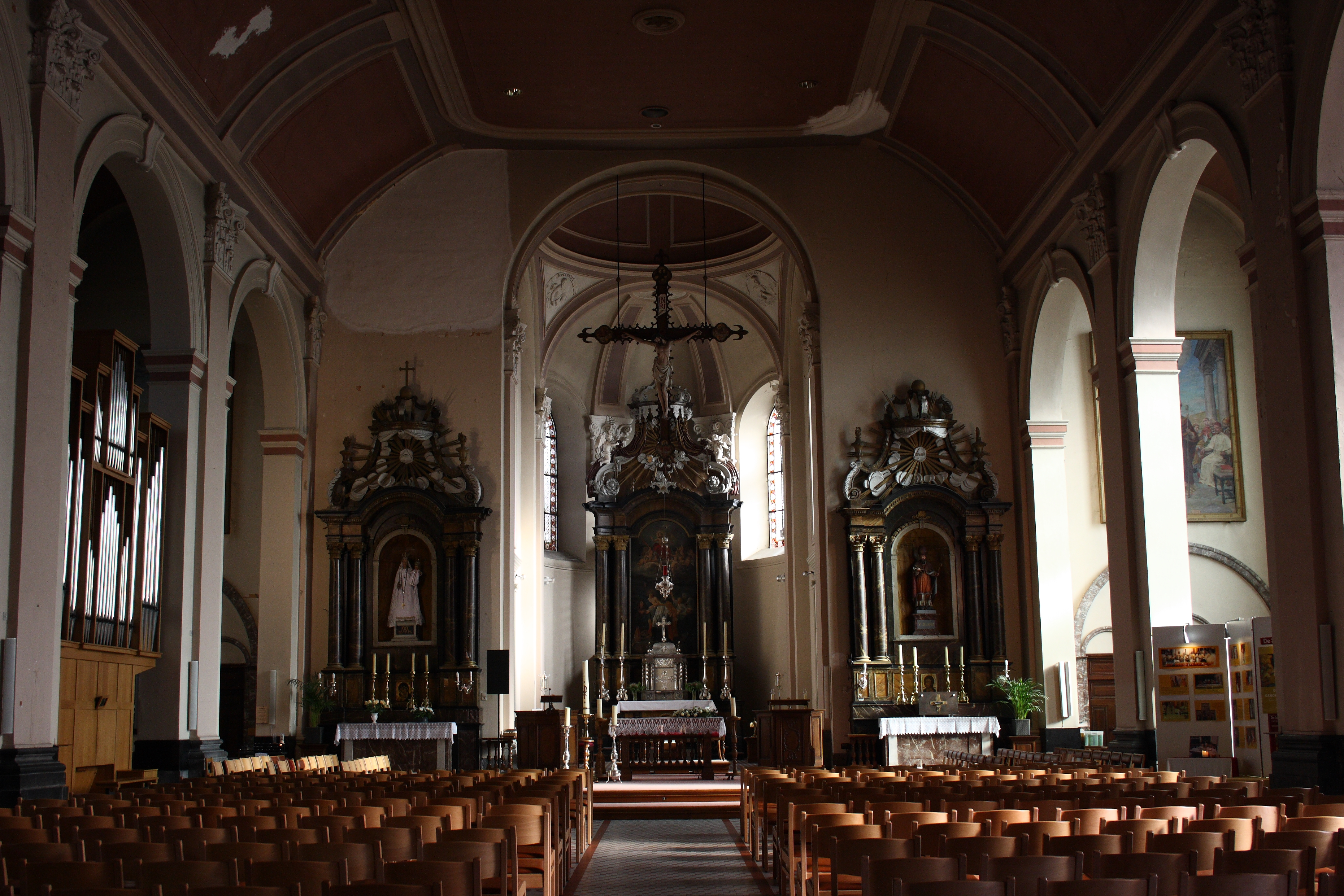 Kirche Sint-Servatius in Diepenbeek in der belgischen Region Flandern